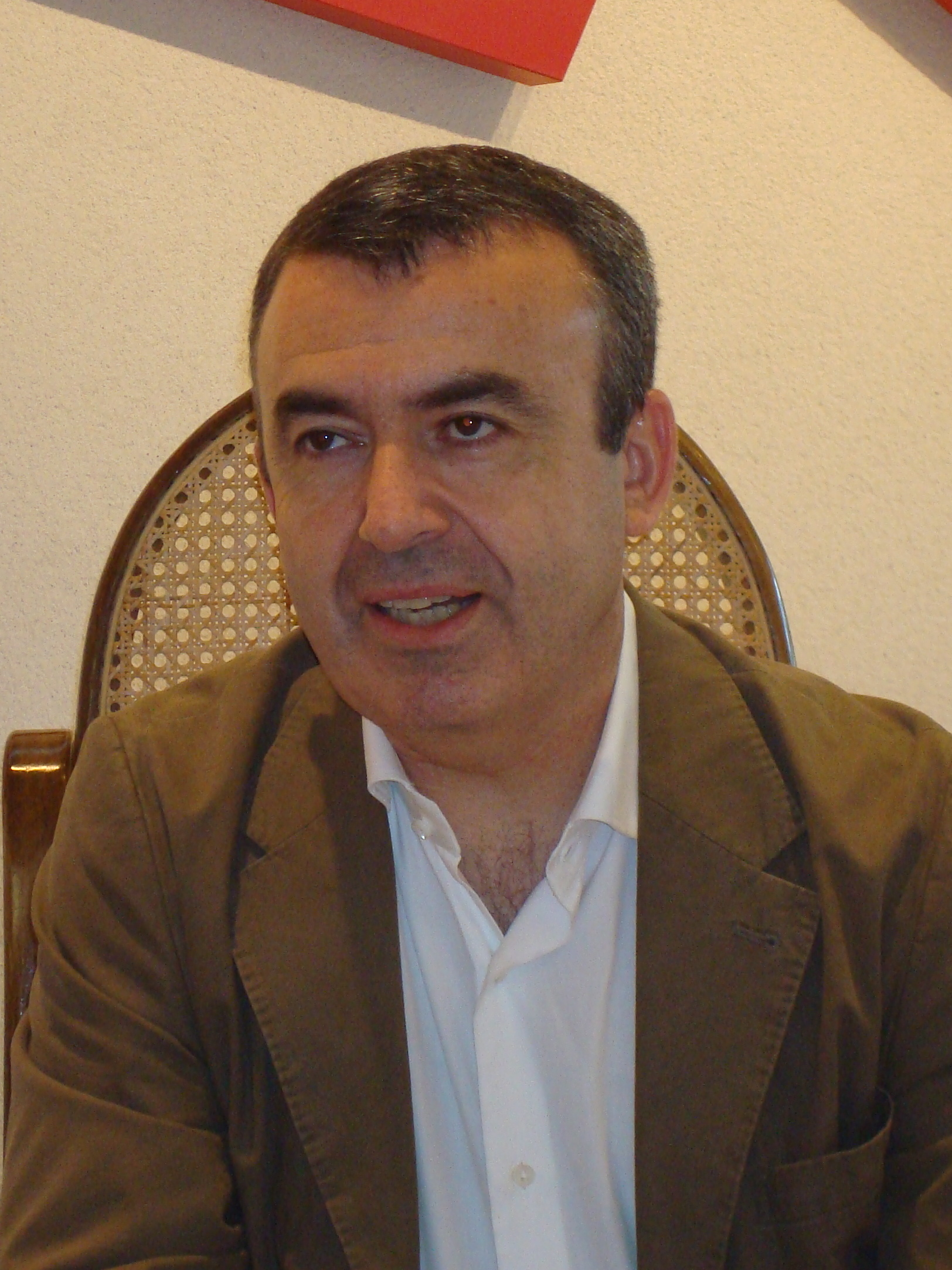 Lorenzo Silva a la biblioteca d'Olesa de Montserrat 27.05.2014